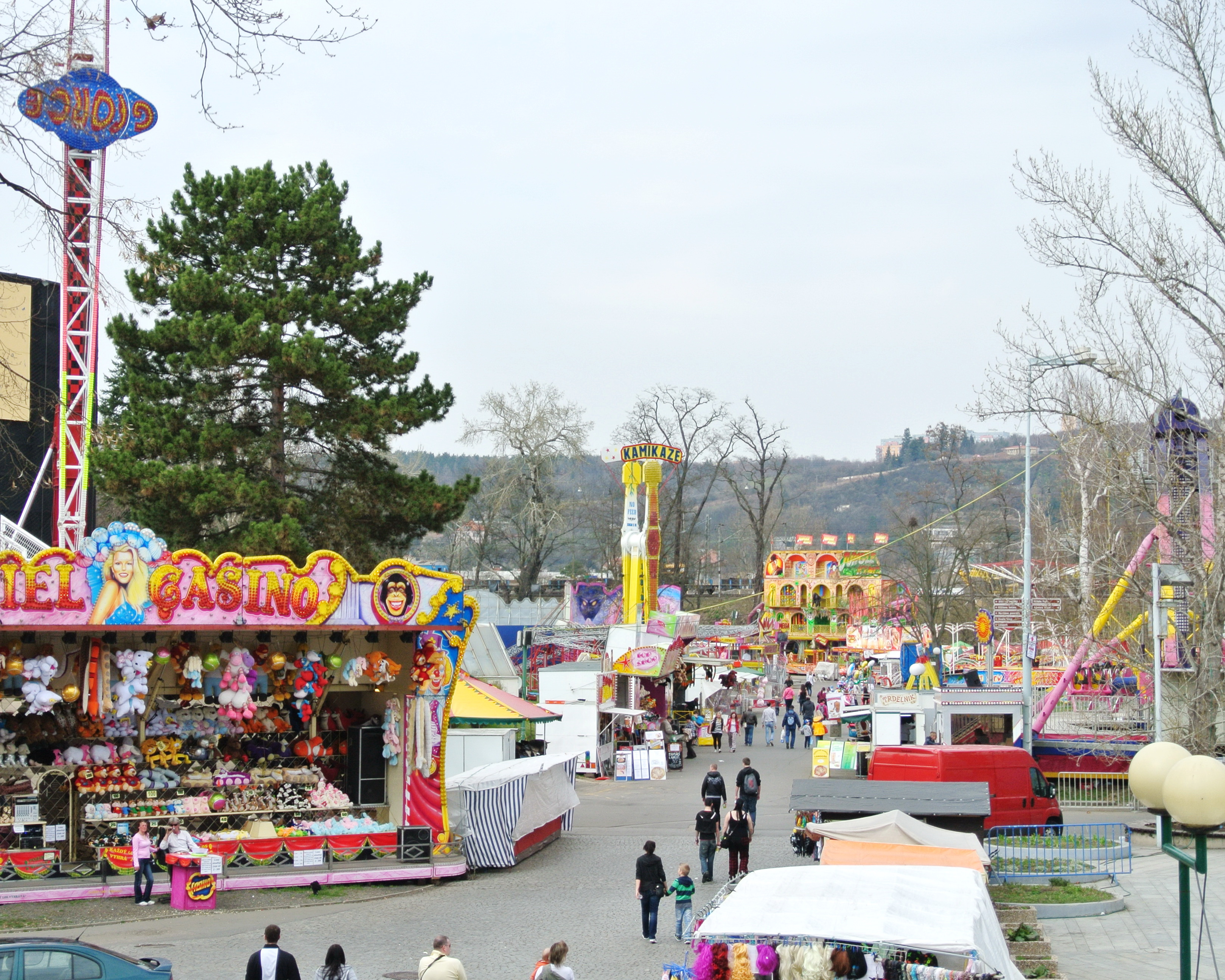 Matějská pouť v Praze - 2013